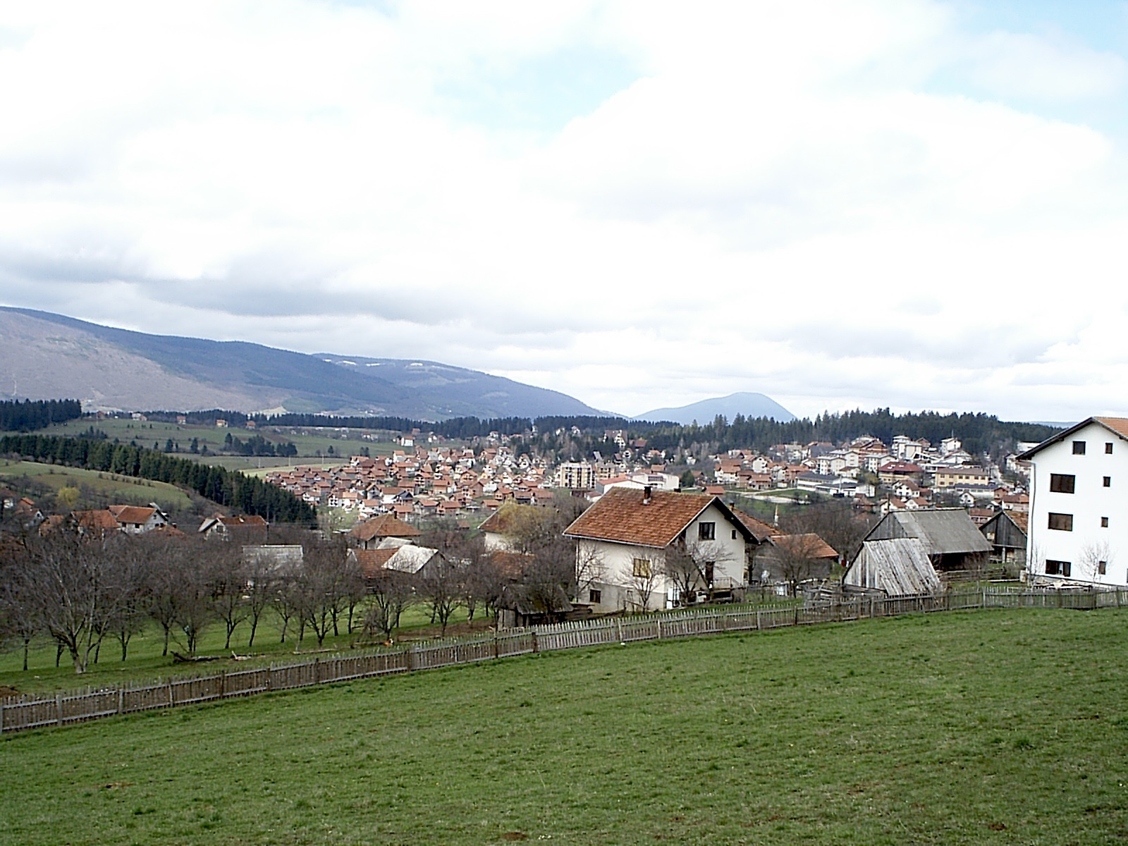 Panorama Knezeva